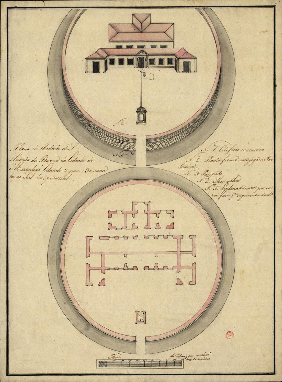 "Plano do Reducto de S. Antonio da Barra da Cidade do Maranhão..." (post. 1750, Biblioteca Nacional, Lisboa)